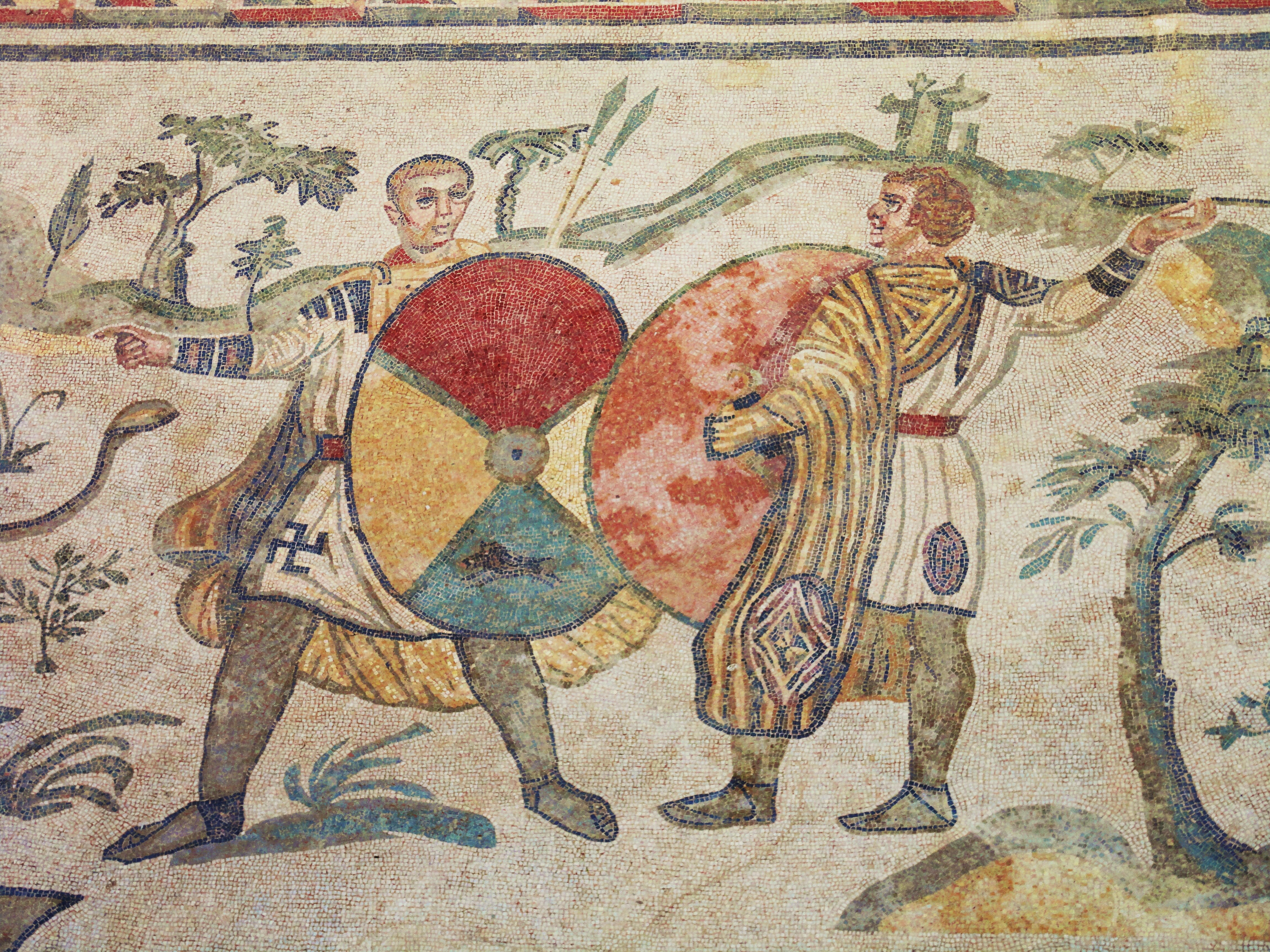 Villa romana di Piazza Armerina - Sicilia